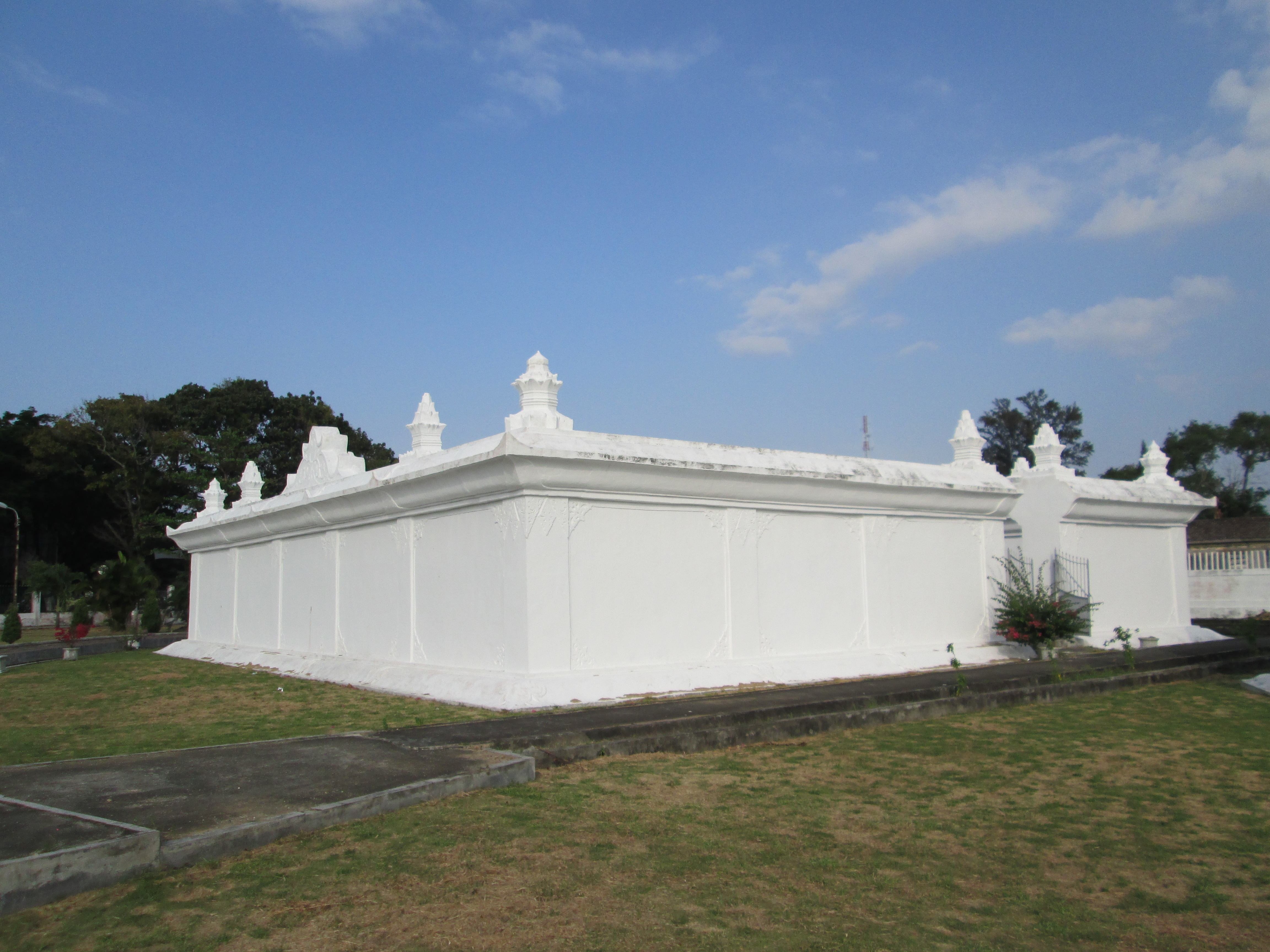 Acèh: Kandang Taman Ghairah